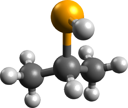 異丙硒醇 球棒模型